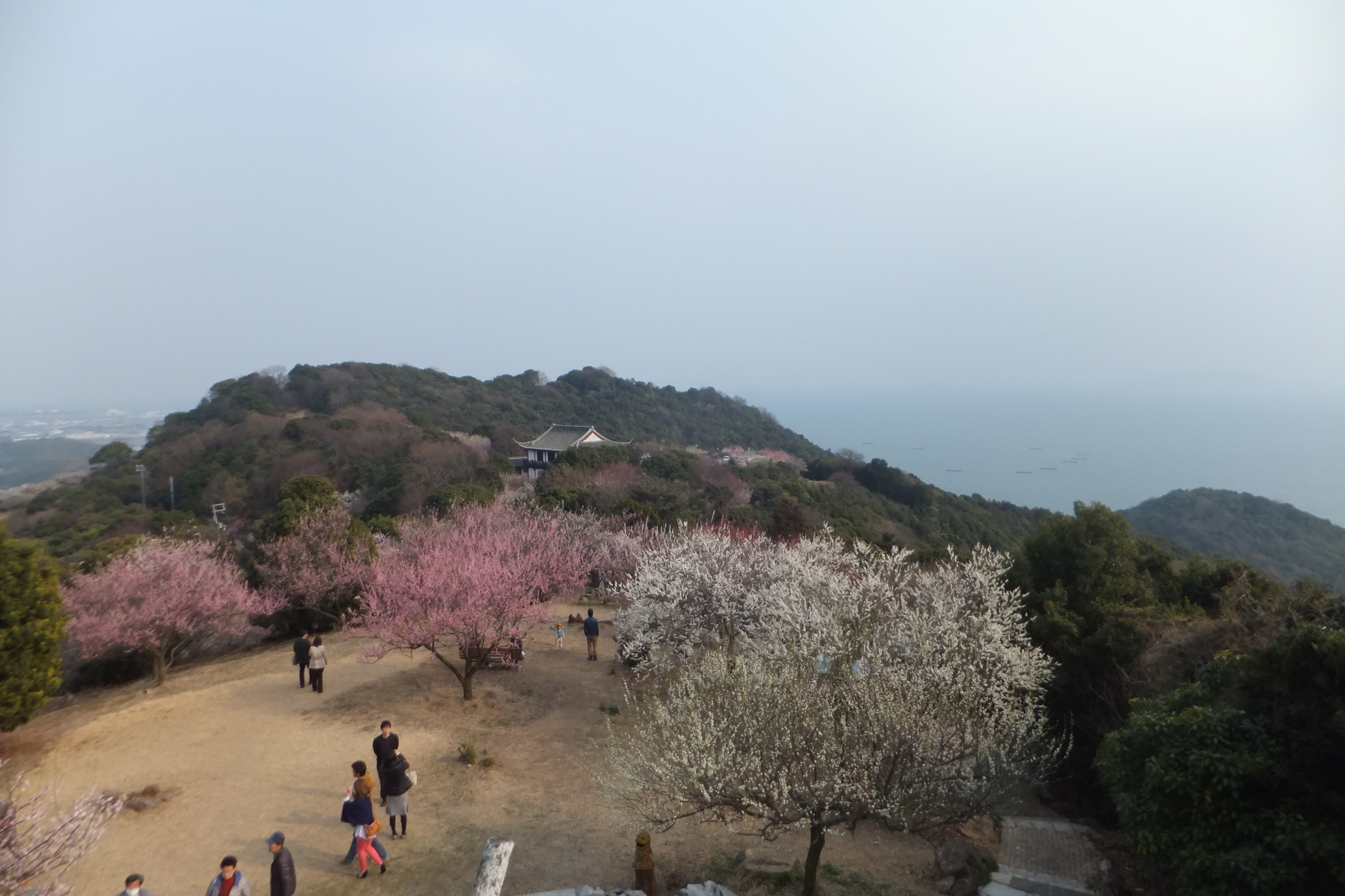 御津自然観察公園（世界の梅公園）